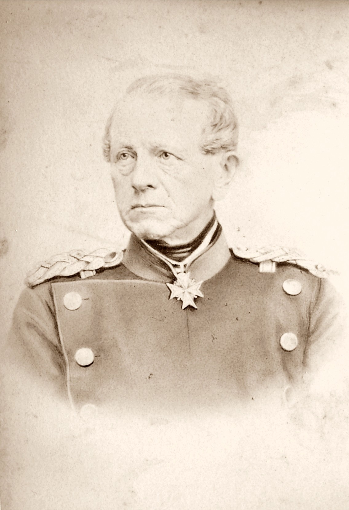 Helmuth Karl Bernhard von Moltke